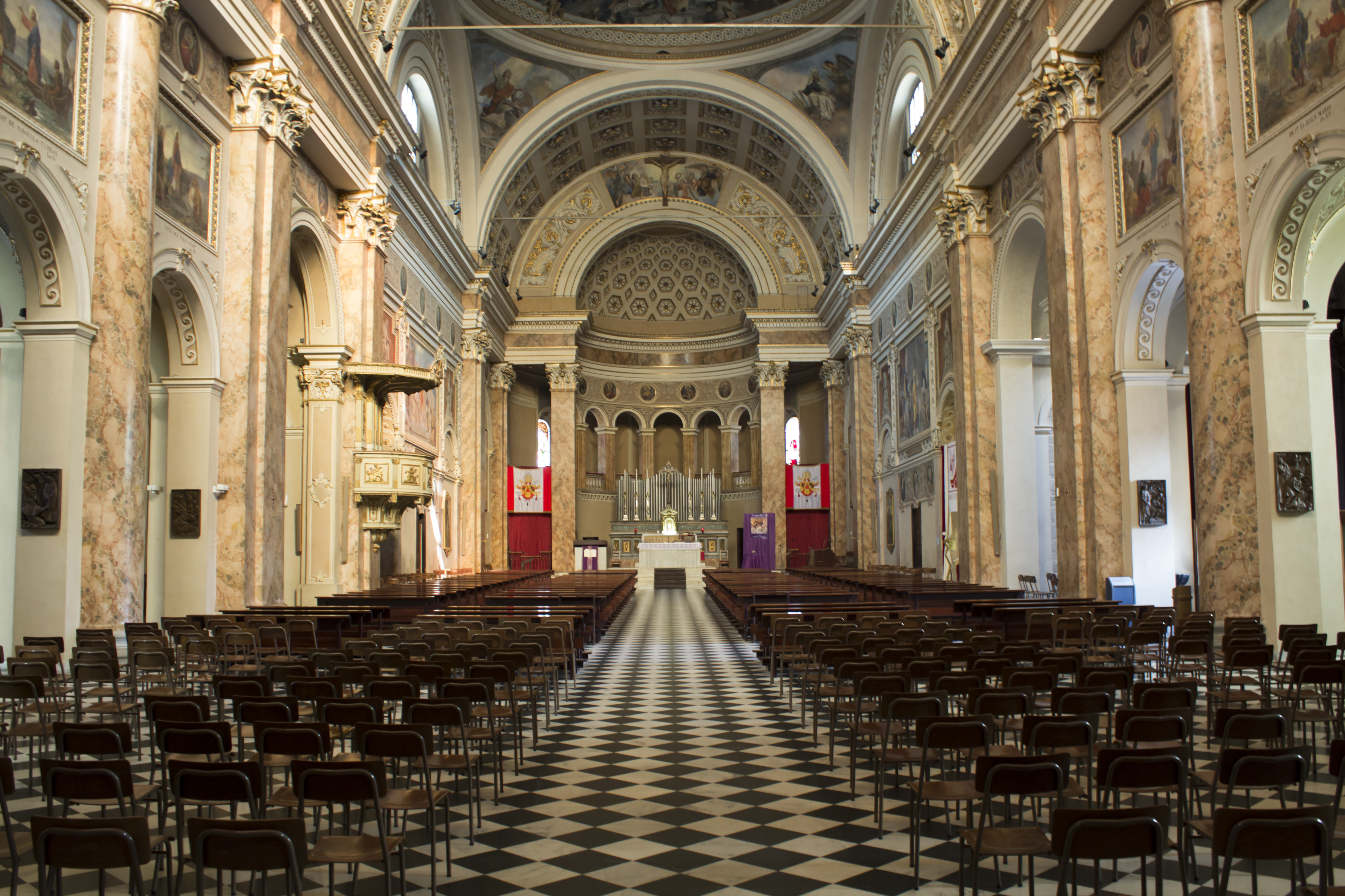 San Nicolò, Lecco (Italy) interno